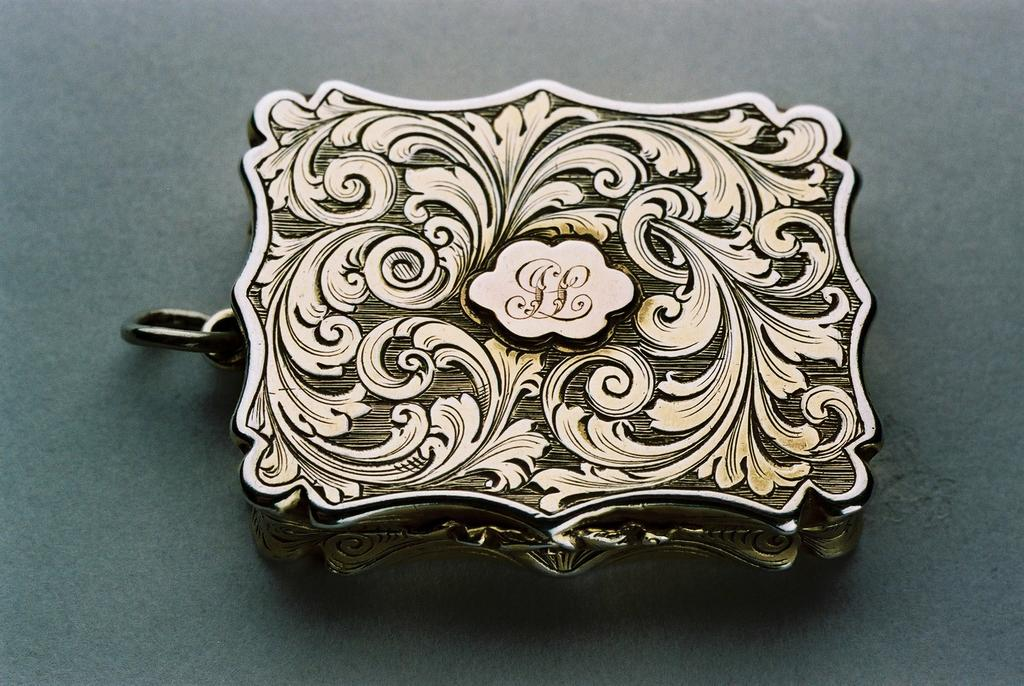 Victorian silver vinaigrette.